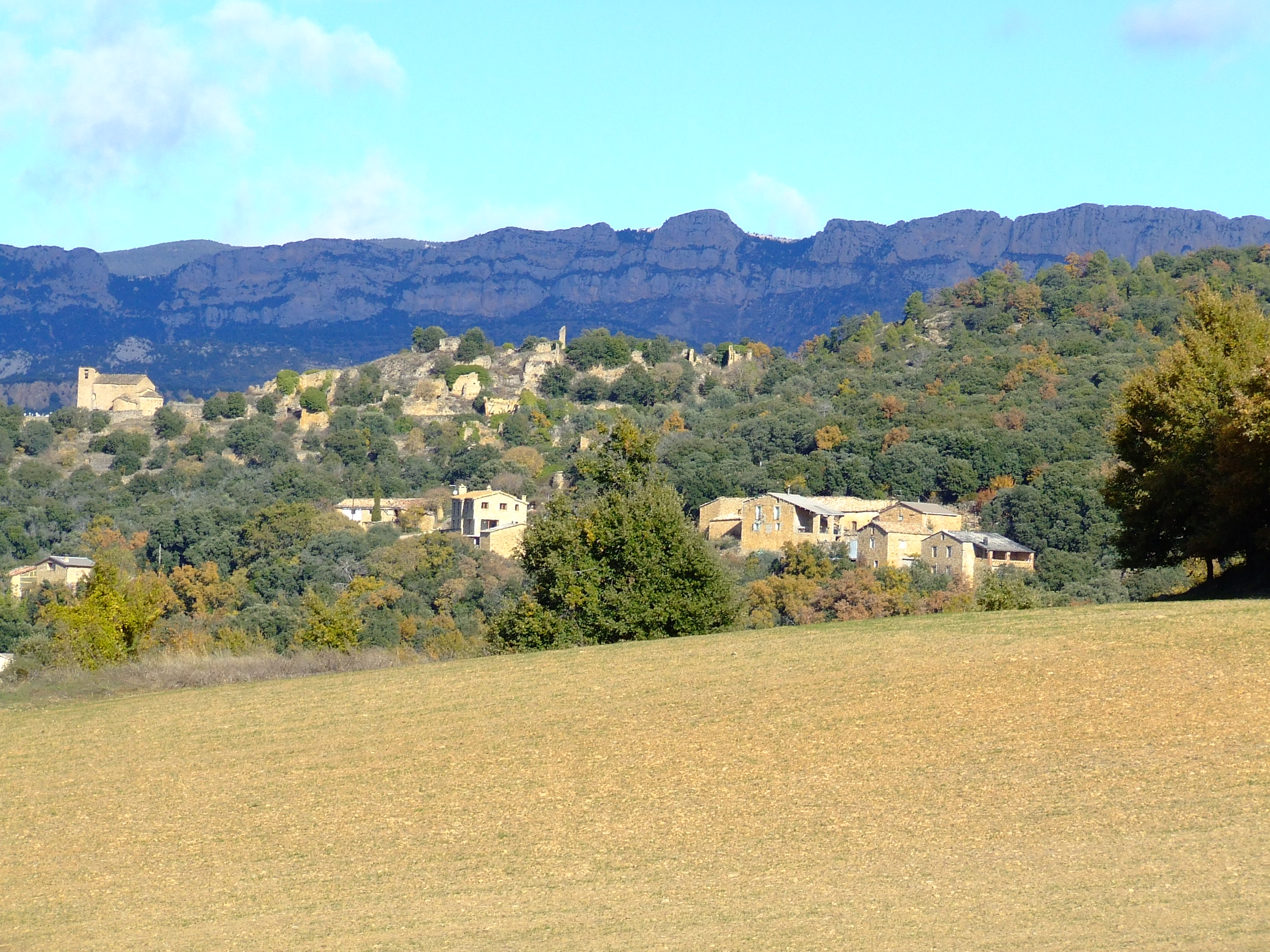 Biscarri: el poble vell i el poble nou (Benavent de la Conca, Isona i Conca Dellà, Pallars Jussà)